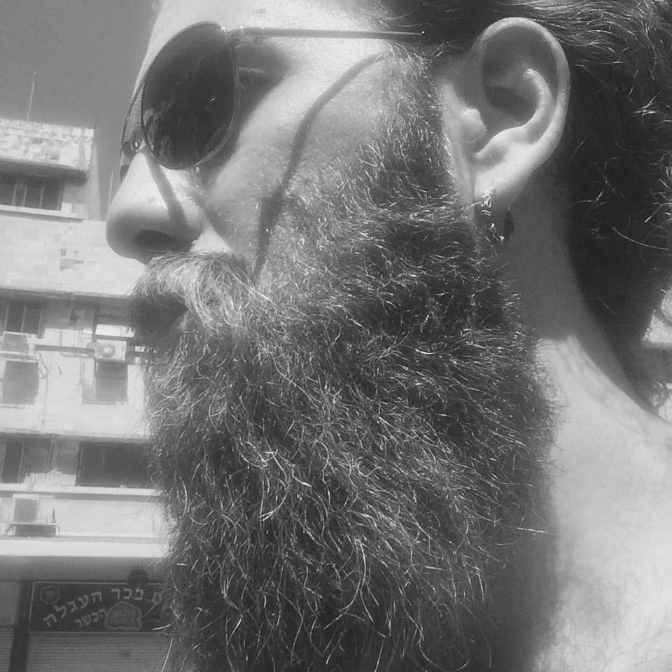 ערן מינהר